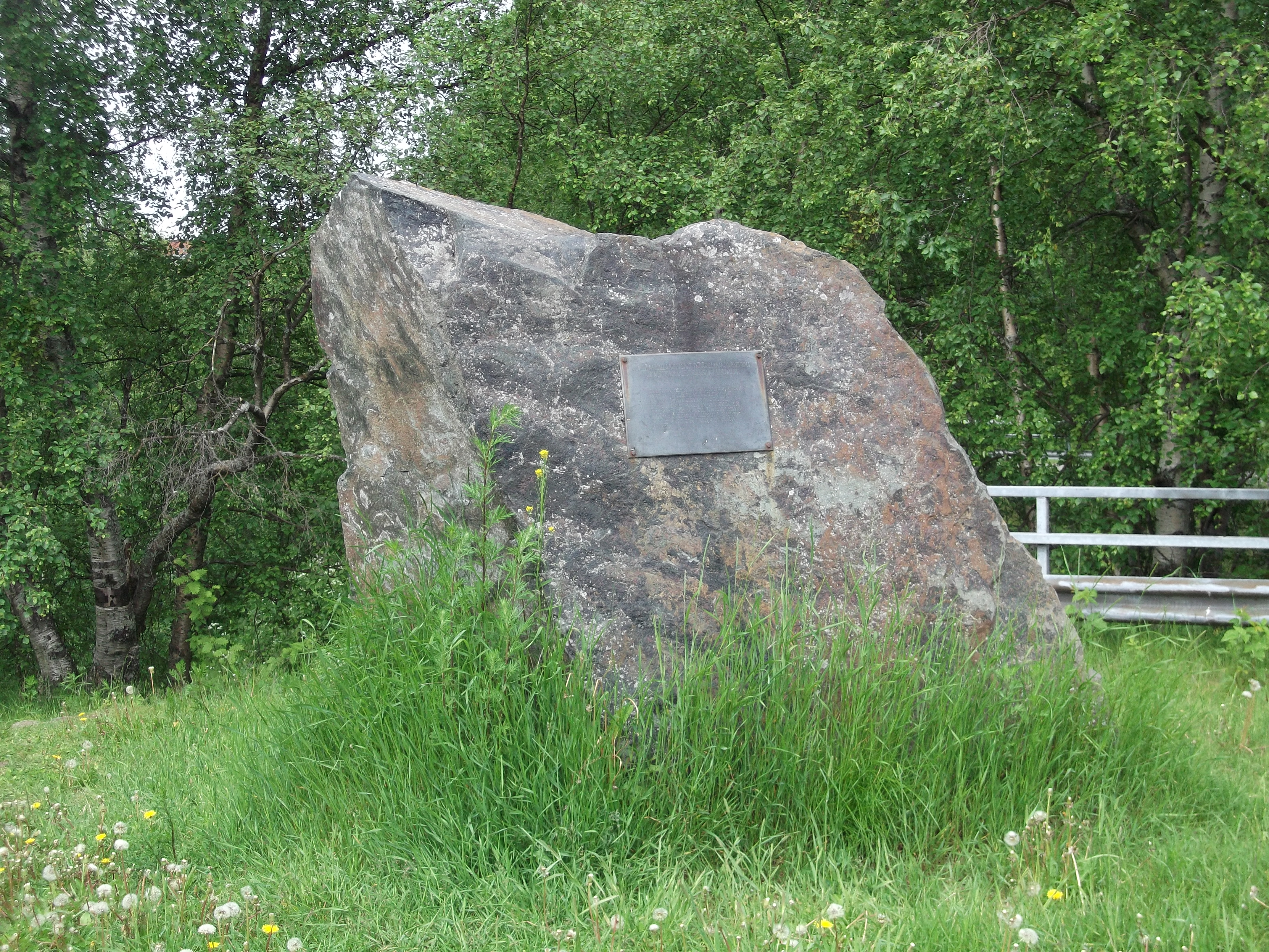 Kemin veritorstain muistomerkki tapahtumapaikalla.